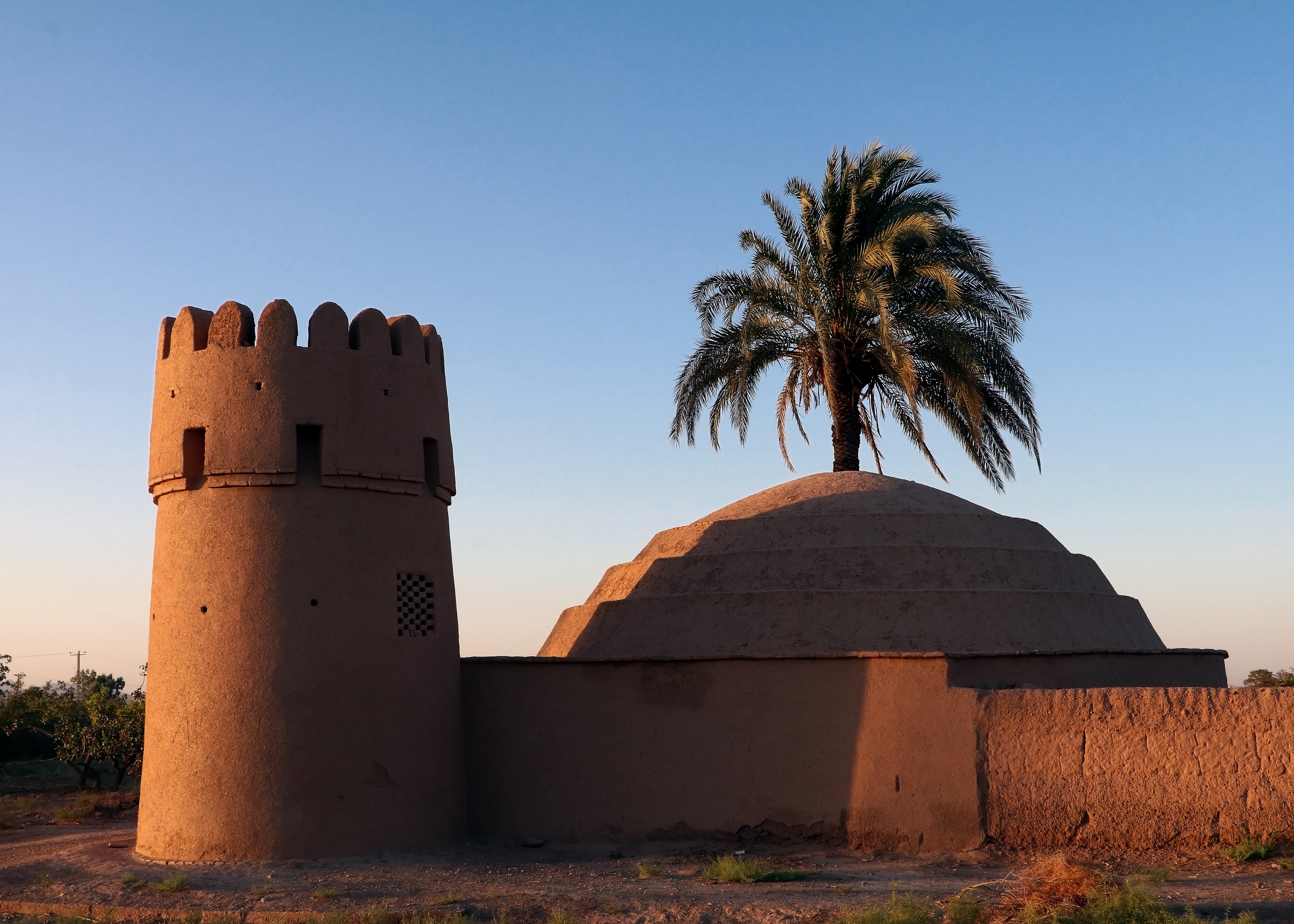 مجموعه یاور